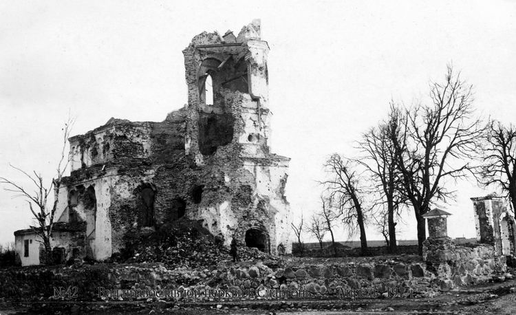 Беларуская (тарашкевіца): Смаргонь (Smarhoń), вуліца Менская (vulica Mienskaja). Кальвінскі збор